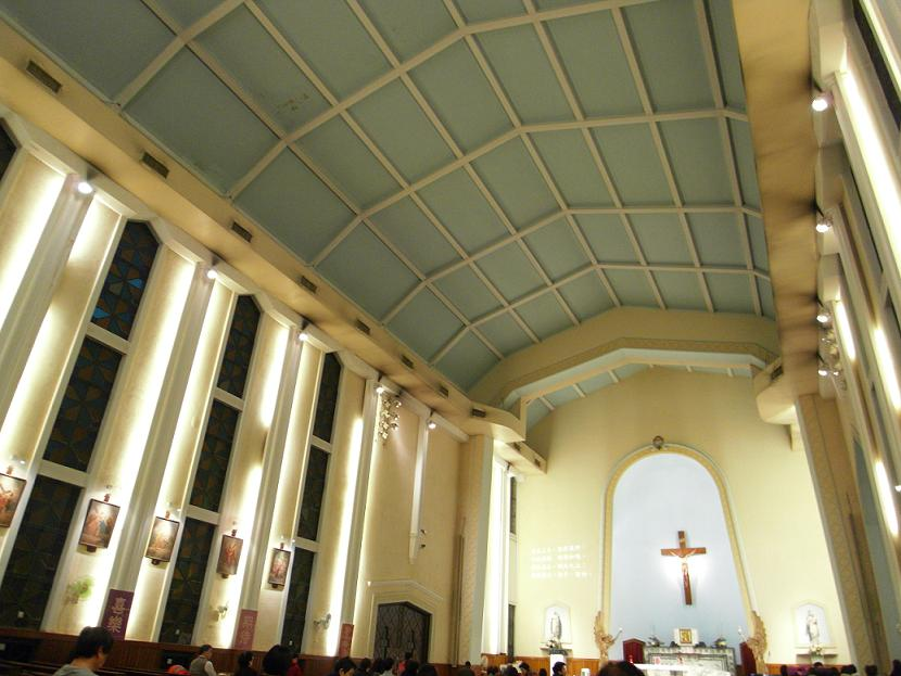 中文（香港）: 聖安多尼堂內貌, 薄扶林, 香港, 中國